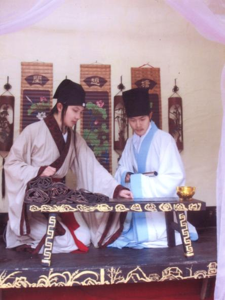 deux gars Han chinois habillés en hanfu